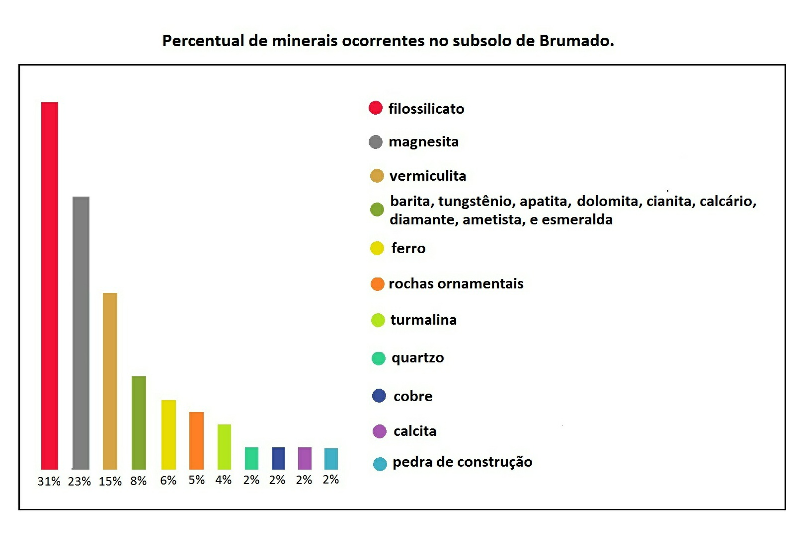 gráfico de minerais da Serra das Éguas